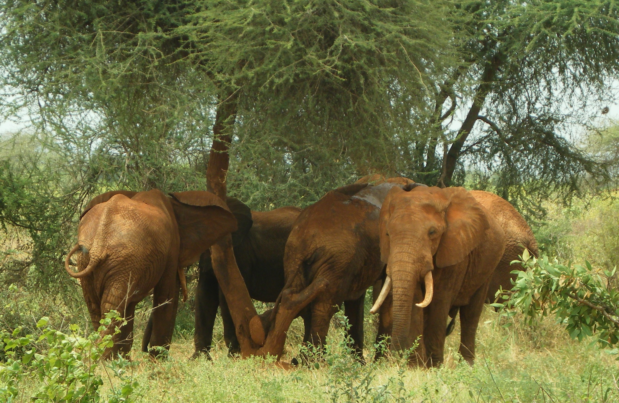 Junggesellengruppe von Afrikanischen Elefanten im Tsavo Ost Nationalpark in Kenia. Auf dem Bild sind fünf Elefantenbullen zu erkennen. Es handelt sich um lockere Verbände.